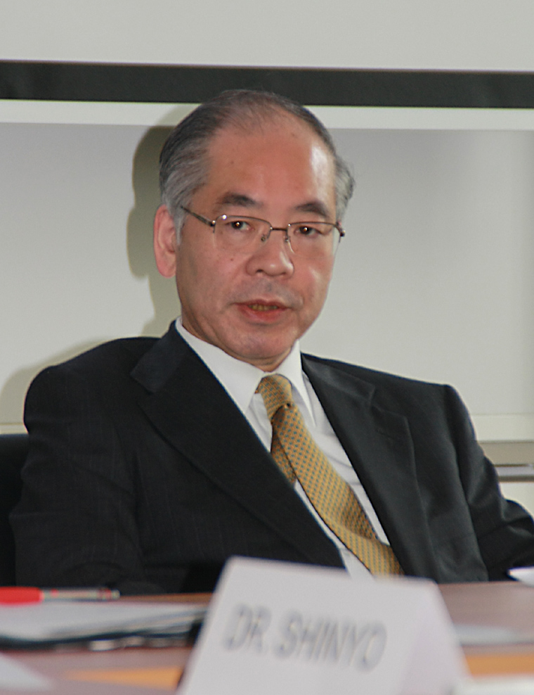 Takahiro Shin’yo, japanischer Diplomat, Seit 2008 außerordentlicher und bevollmächtigter Botschafter von Japan in der Bundesrepublik Deutschland. Hier am 29. Juni 2011 in Hannover.